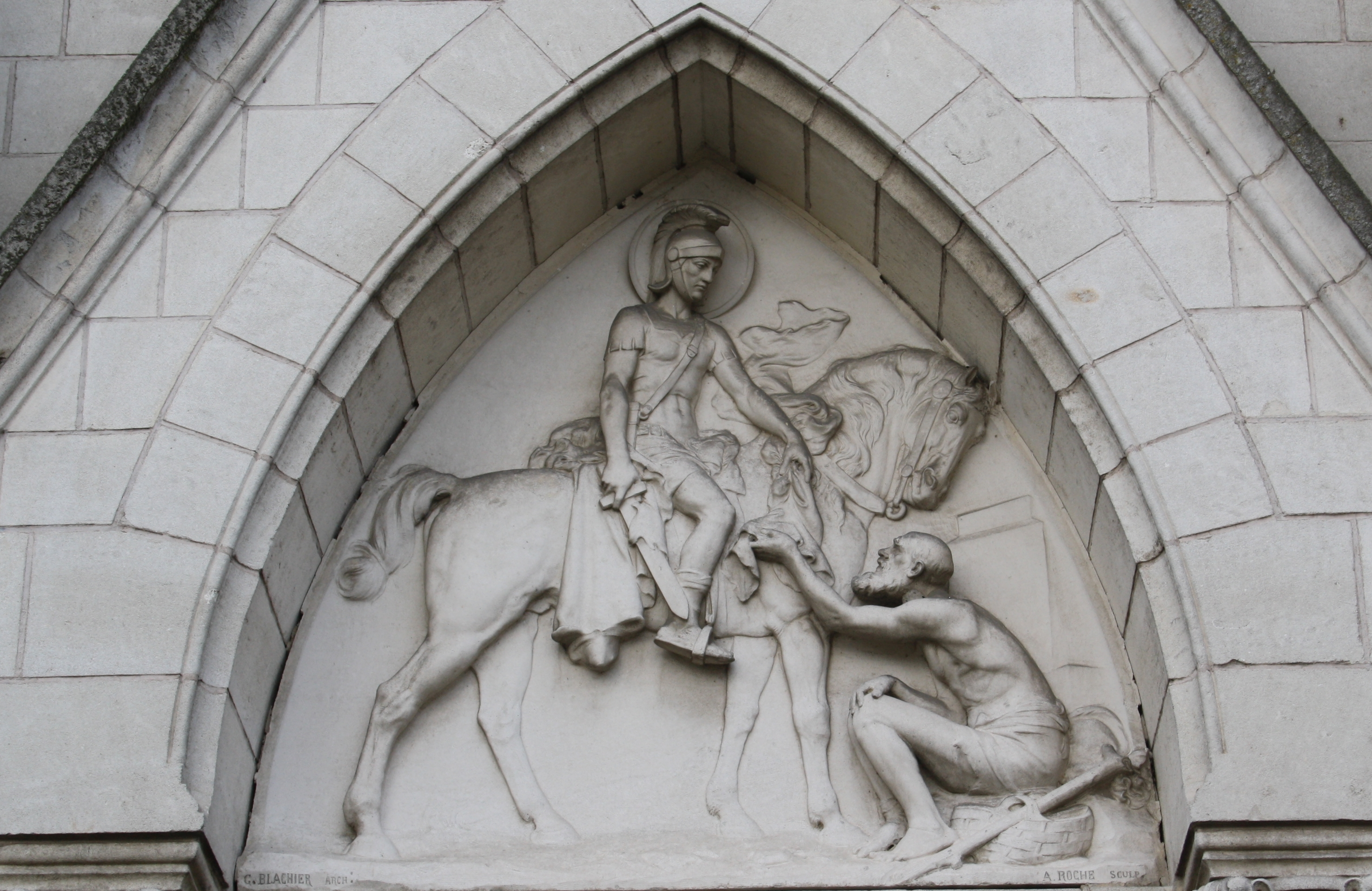 Détail de l'église Saint-Martin de Magneux-Haute-Rive